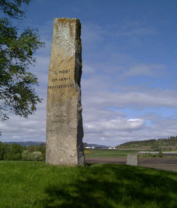 Bauta over Frostatinget, Frosta.